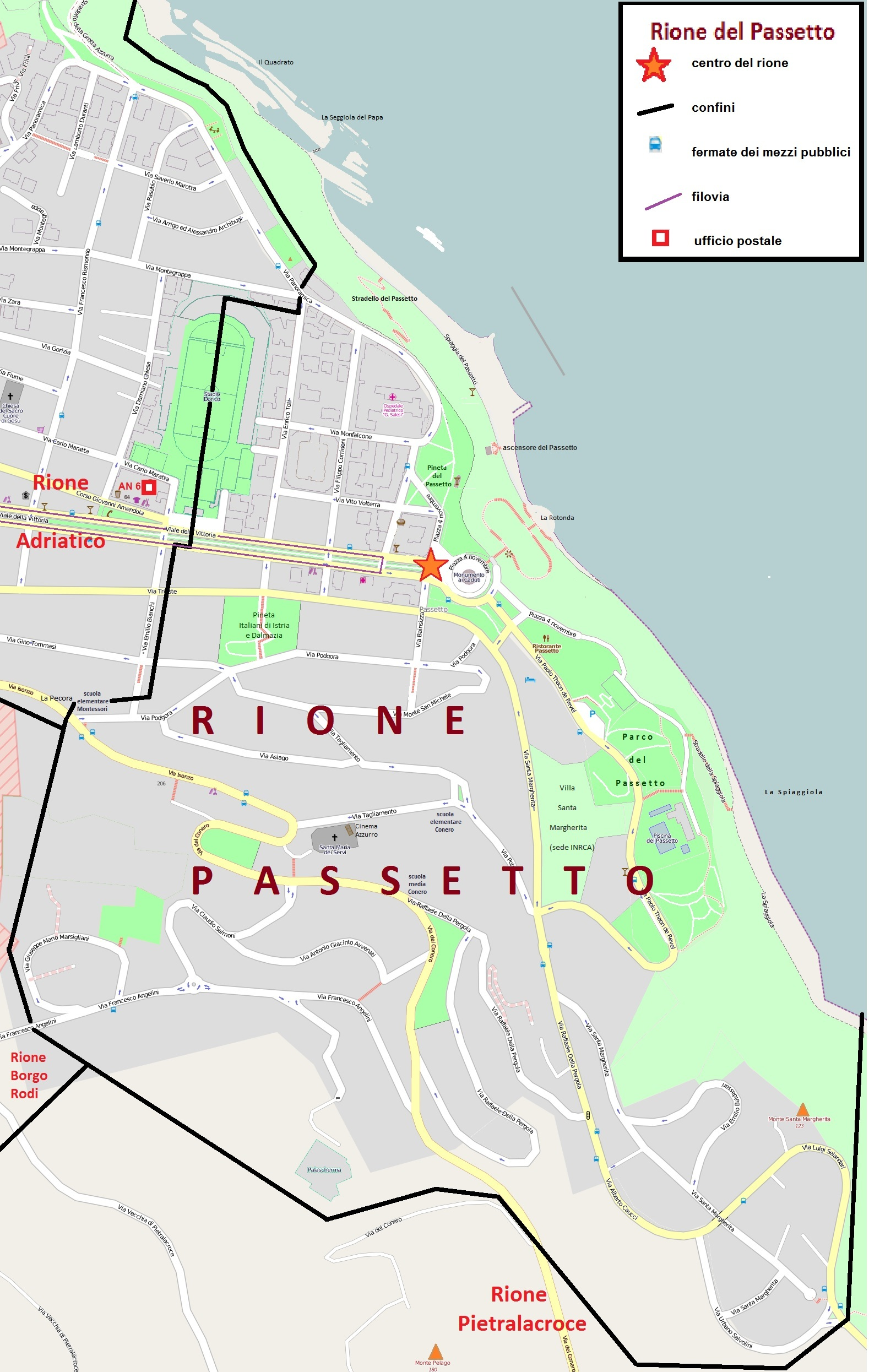 Mappa del quartiere Passetto di Ancona, con i confini, le vie, le piazze e i parchi.